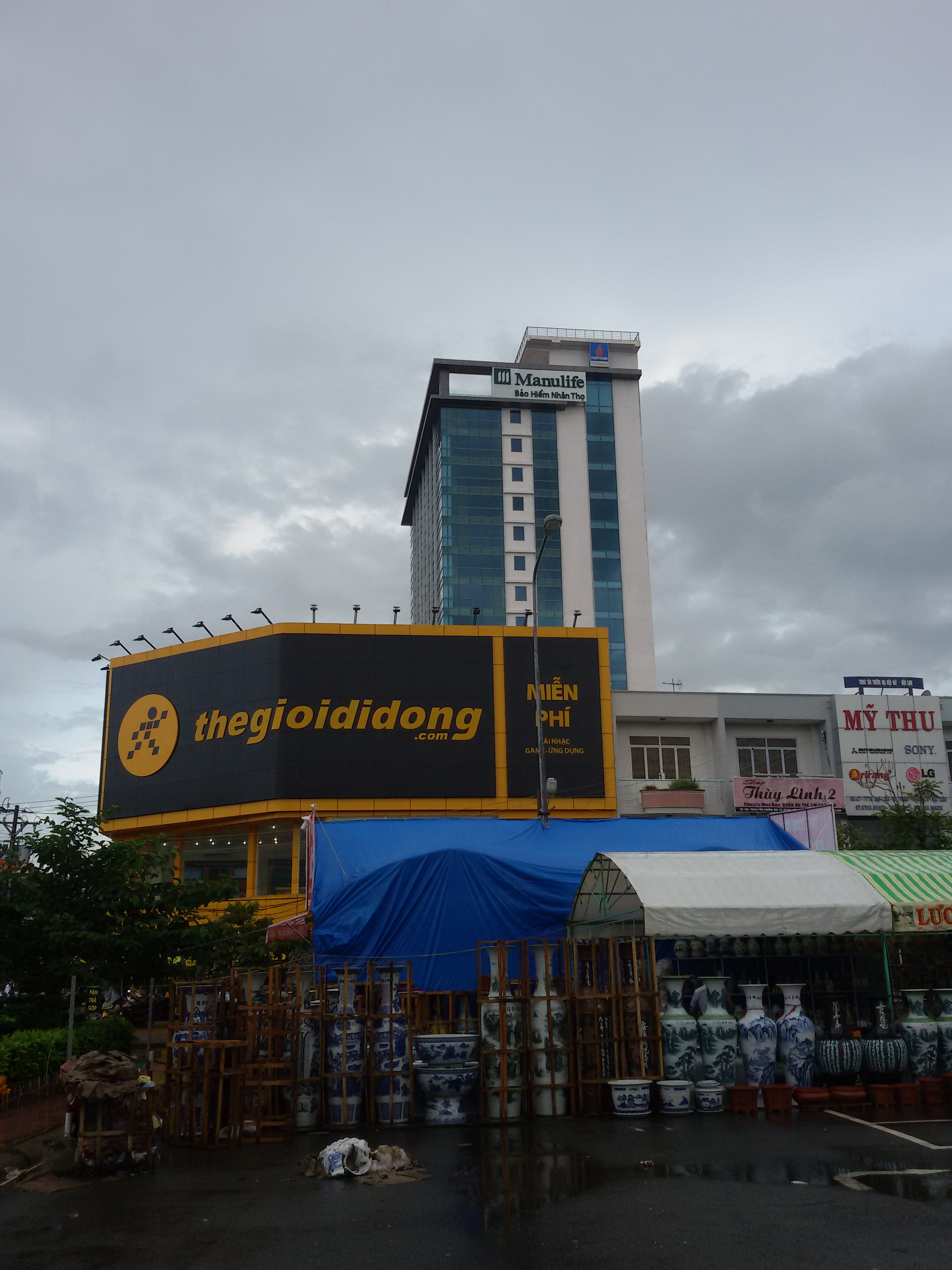 Cao ốc Bạc Liêu